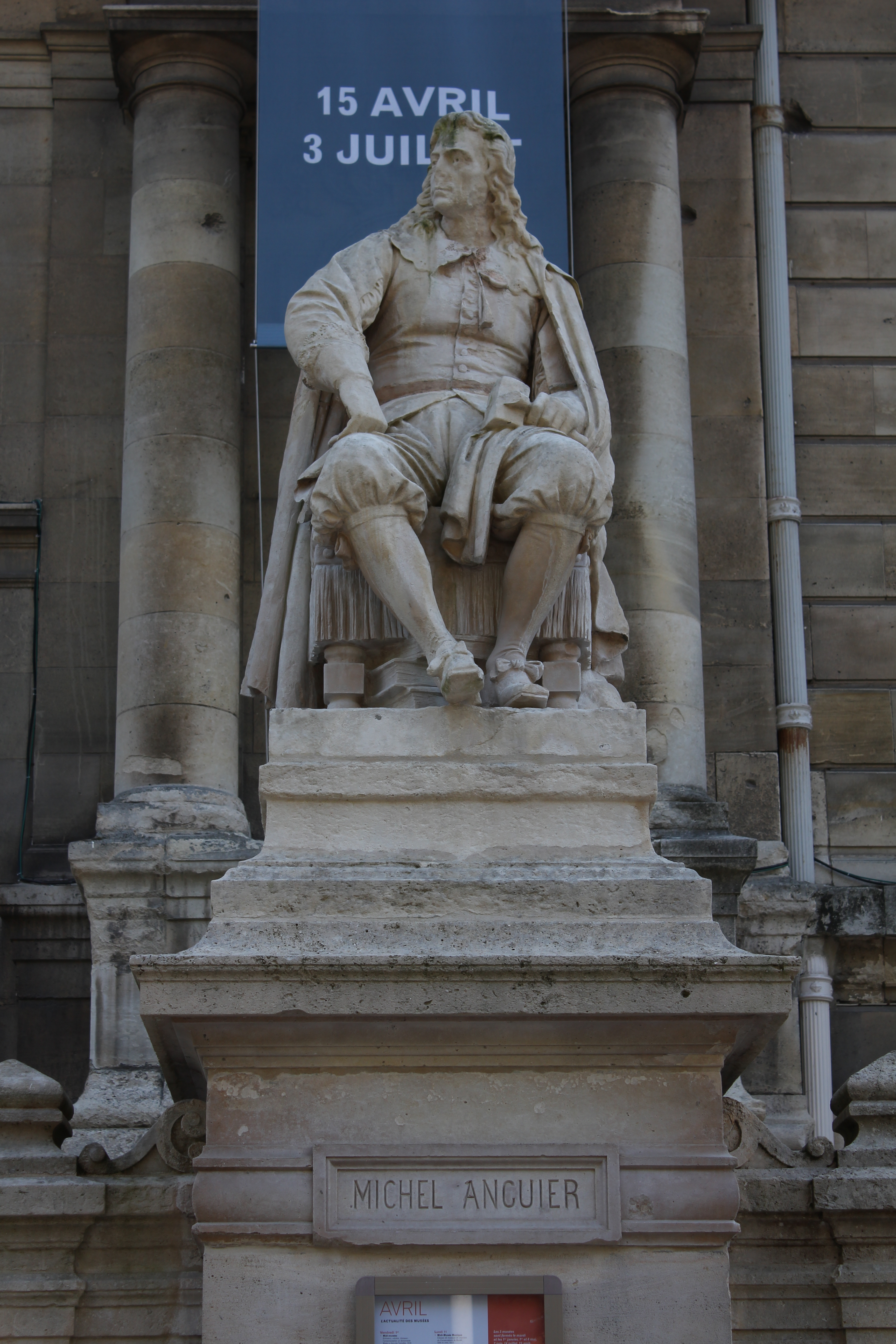 Statue de Michel Auguier, Musée des beaux-arts de Rouen.